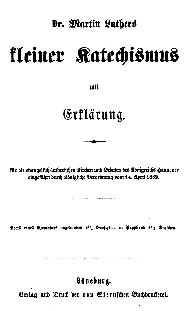 Dr. Martin Luthers kleiner Katechismus mit Erklärung für die evangelisch-lutherischen Kirchen und Schulen des Königreichs Hannover eingeführt durch Königliche Verordnung vom 14. April 1862, Titelseite